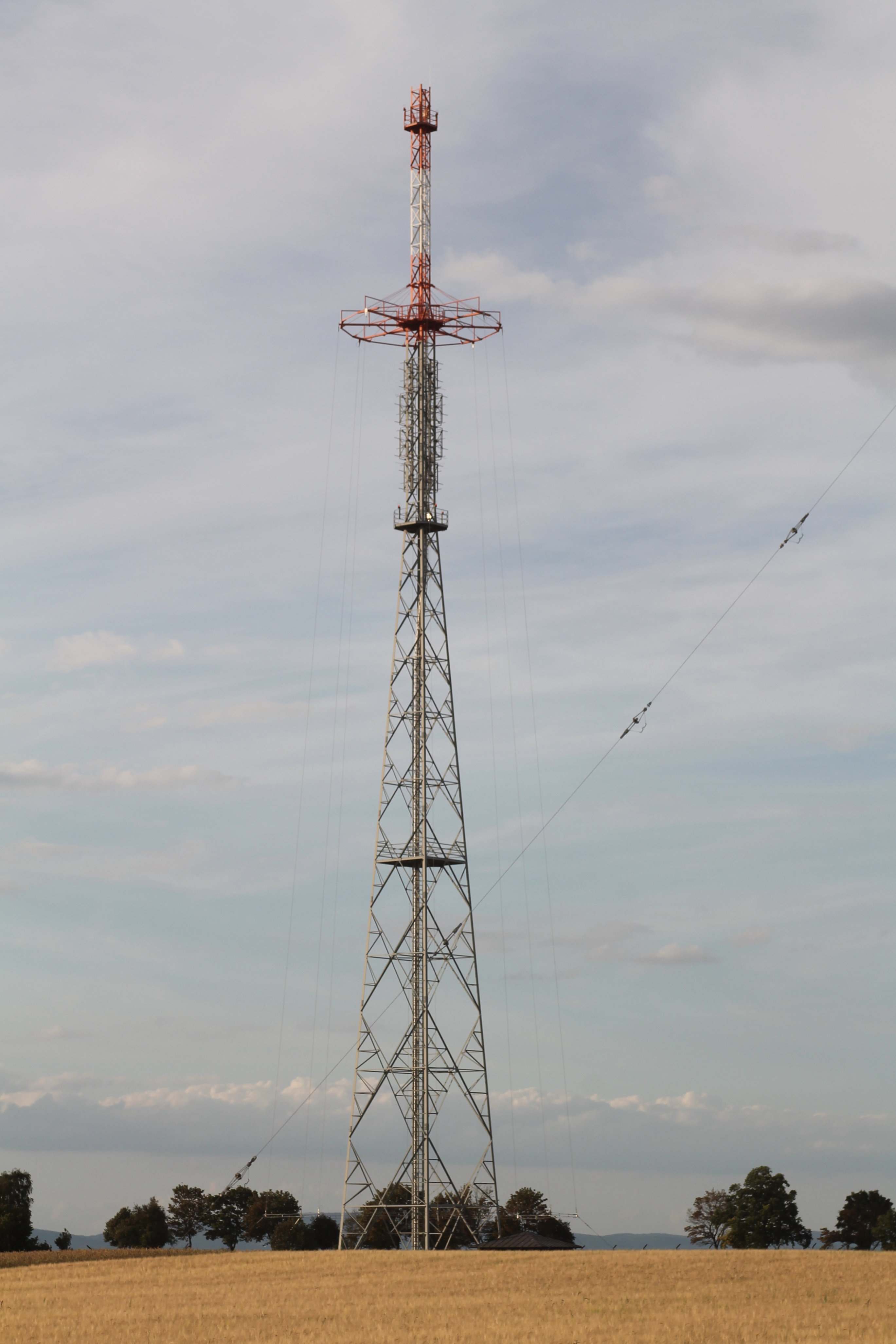 Sendeturm des Rheinsenders